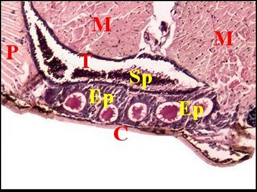 Emplacement des glandes acinoïdes prégonoporales de Tetragnatha extensa en coupe transversale.